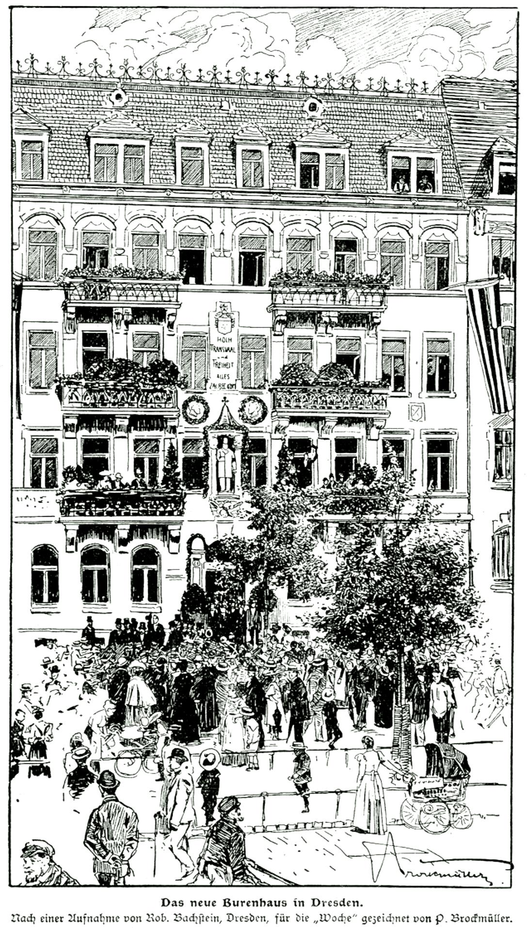 Feierliche Enthüllung der Sandsteinskulptur des transvaalischen Präsidenten Ohm Paul Krüger am Burenhaus in Dresden, Silbermannstrasse 22 am 25.Juli 1901